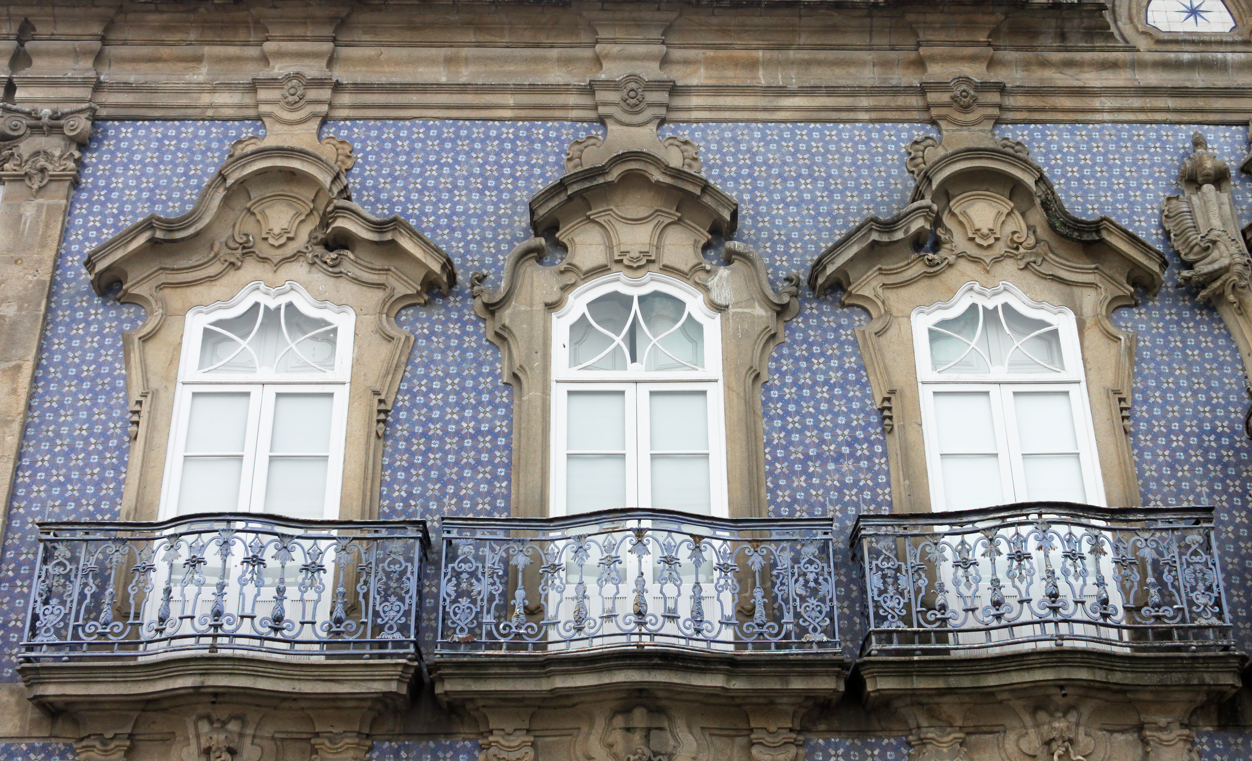 O Palácio do Raio, ou Casa do Mexicano é um palácio, construído em 1754-55. Projecto do arquitecto André Soares This file was uploaded for Wiki Loves Monuments in Portugal with the unique identifier 74588.